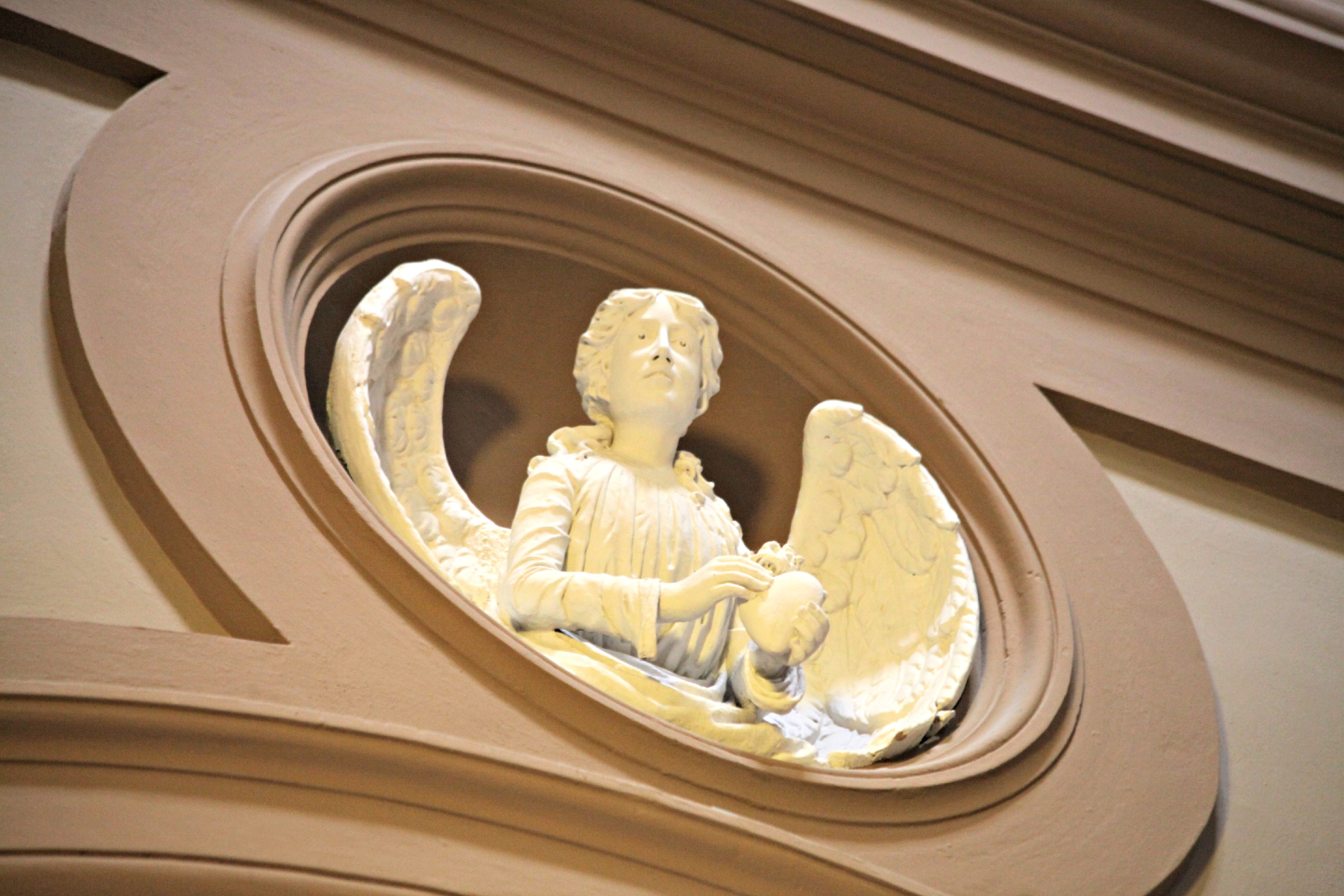 Angelo (3), chiesa della Misericordia, Pontedera